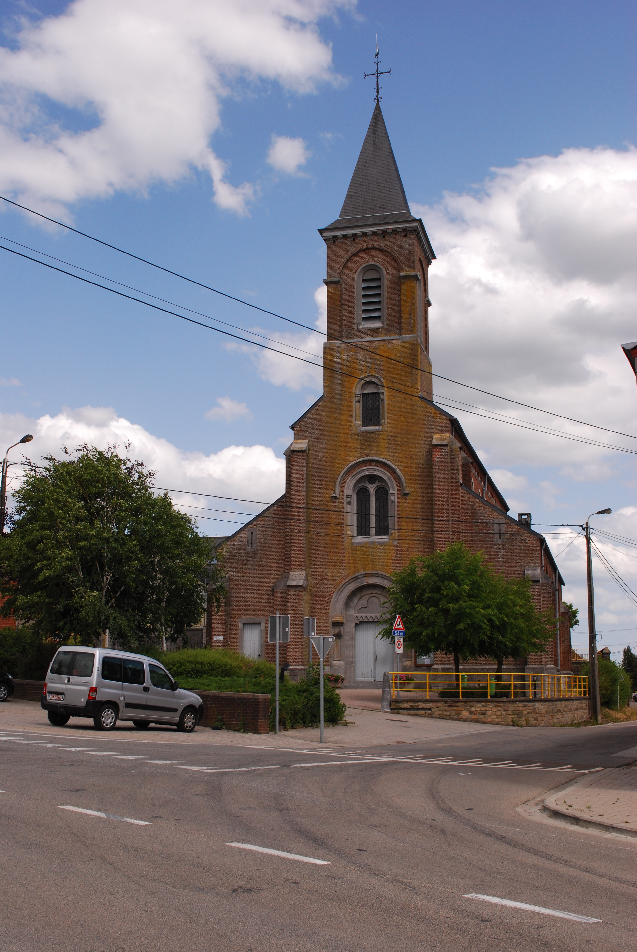 L'église Saint-Rémy à Somme-Leuze.